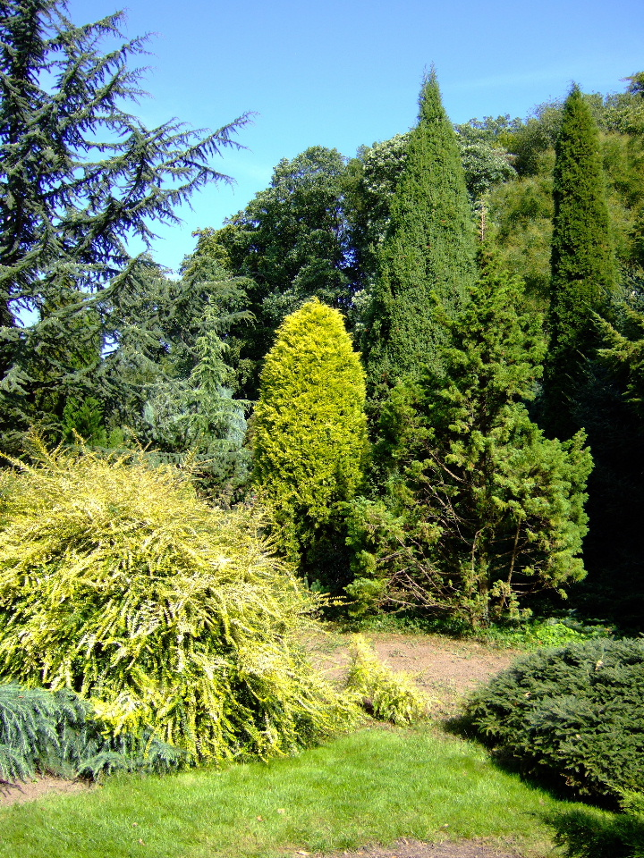 Arboretum Park Härle in Bonn-Oberkassel